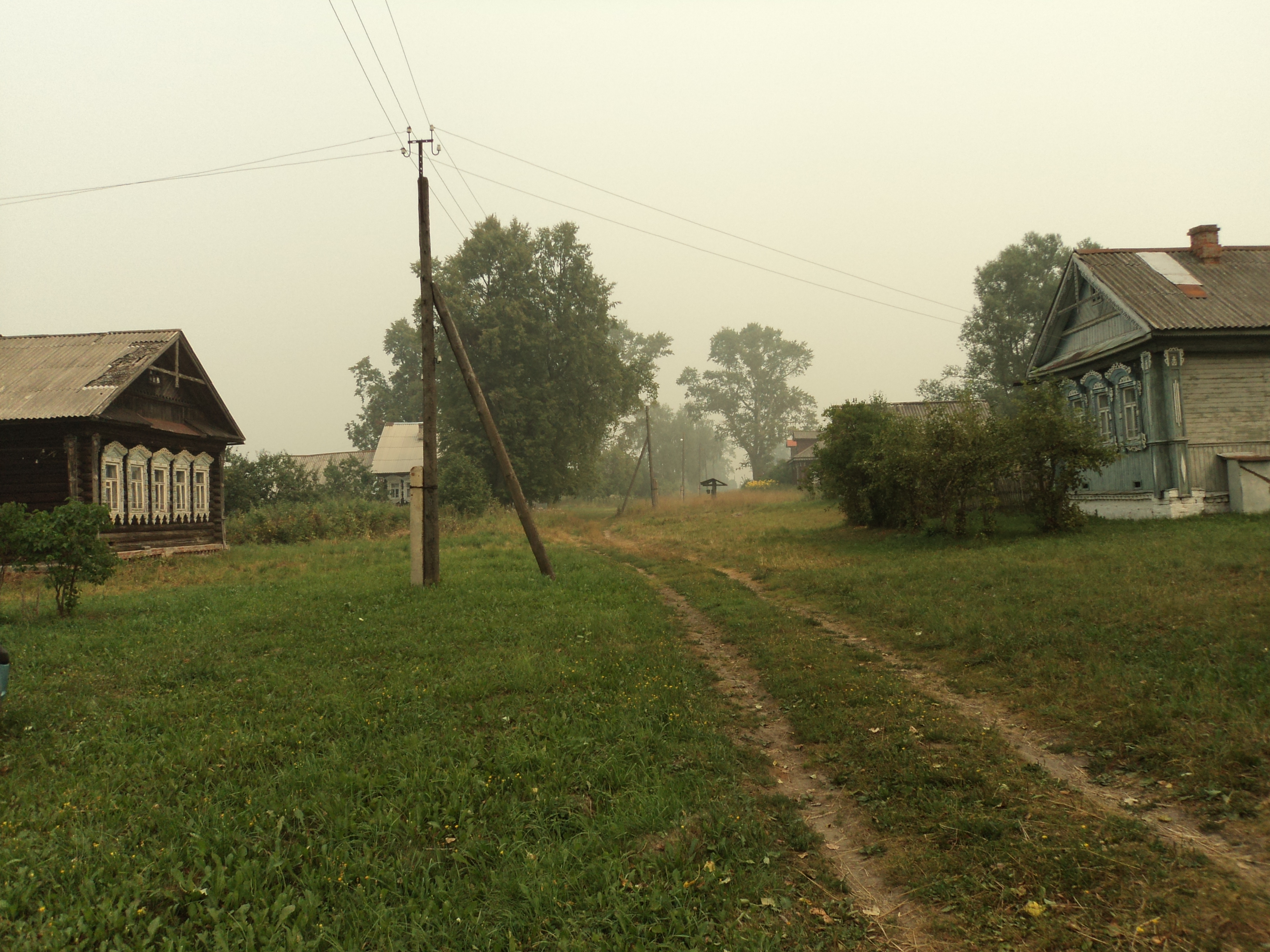 улица в Потанино